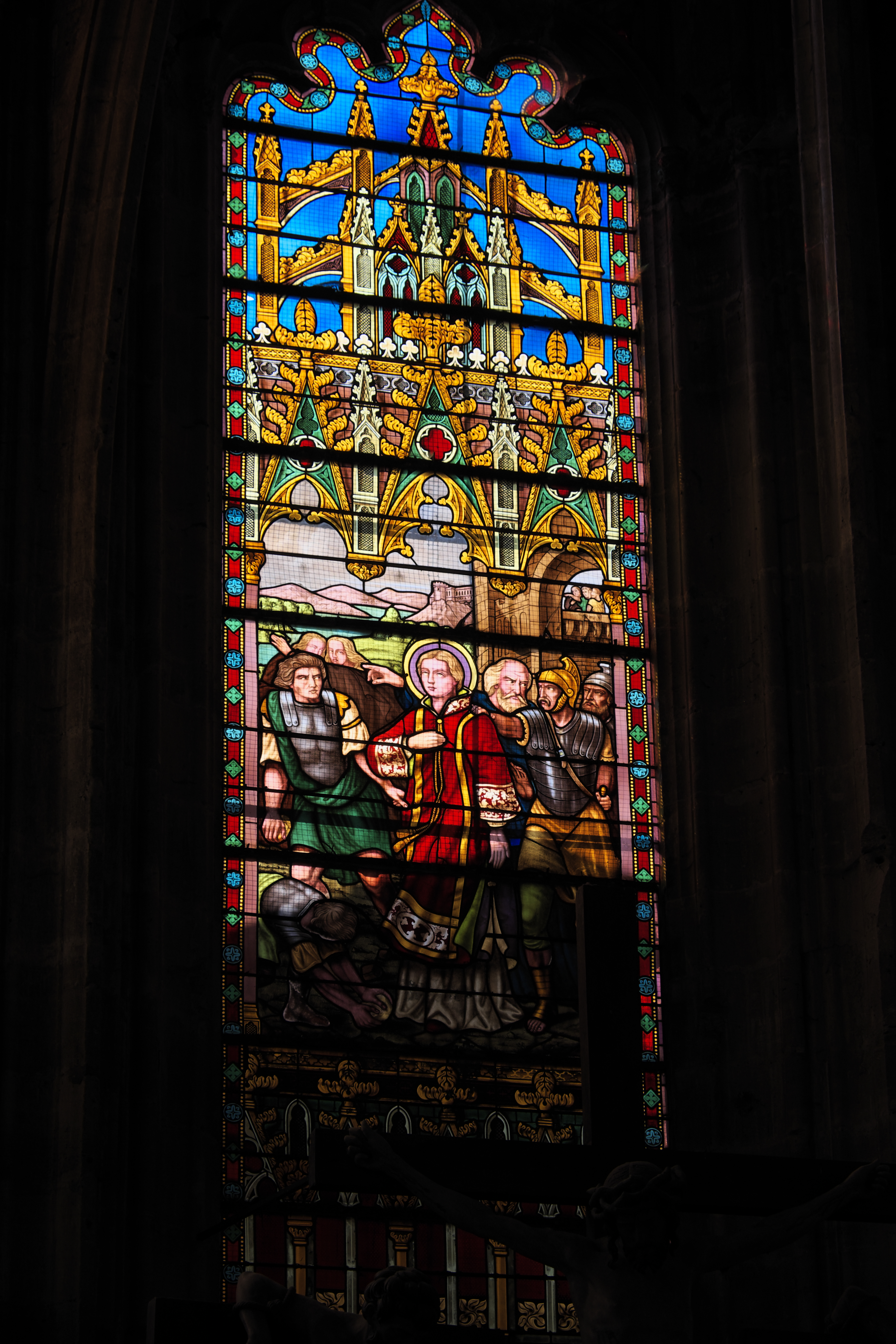 Katholische Kirche Saint-Étienne, ehemalige Kollegiatkirche, in Bar-le-Duc im Département Meuse (Lothringen/Frankreich), Bleiglasfenster, Darstellung: Steinigung des hl. Stephanus.